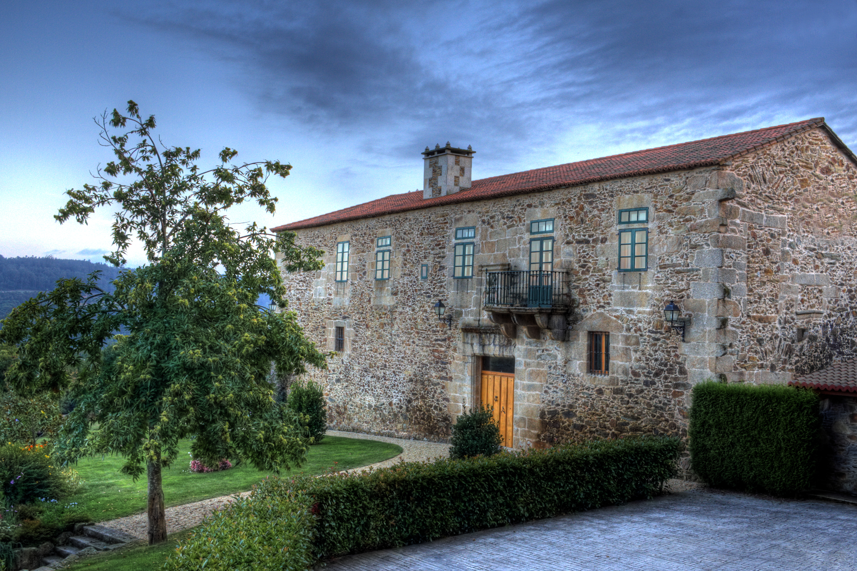 Pazo de Balben - Carral (A Coruña)